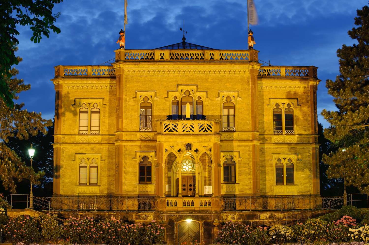 Freiburg im Breisgau, Deutschland, Colombischlössle